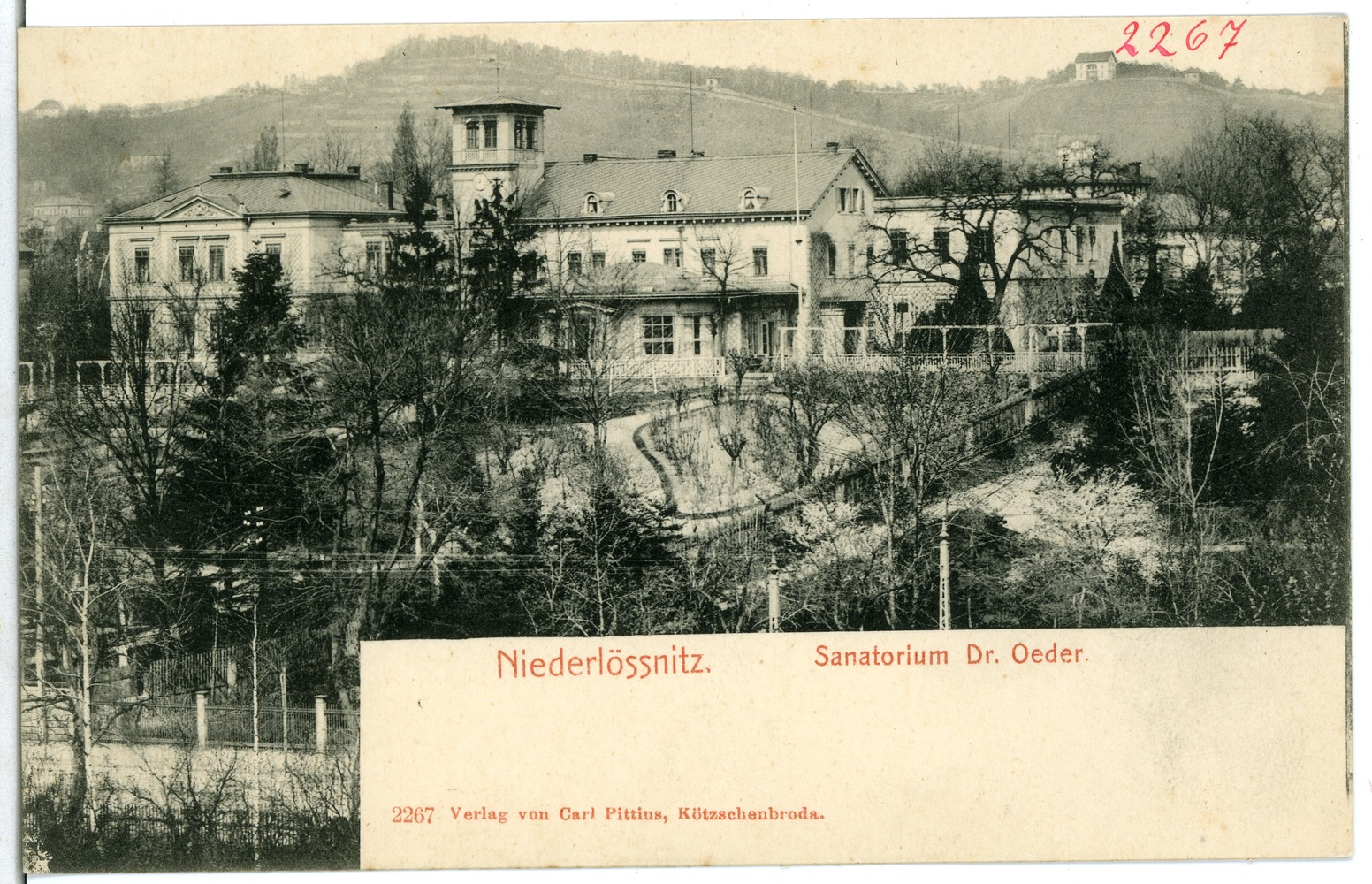 Niederlößnitz; Sanatorium Dr. Oeder This postcard is from publisher Brück & Sohn in Meißen ( postcard has a unique number 02267 and is available in a higher resolution at the publisher. This images was uploaded in a cooperation project between Wikipedians and the publisher.